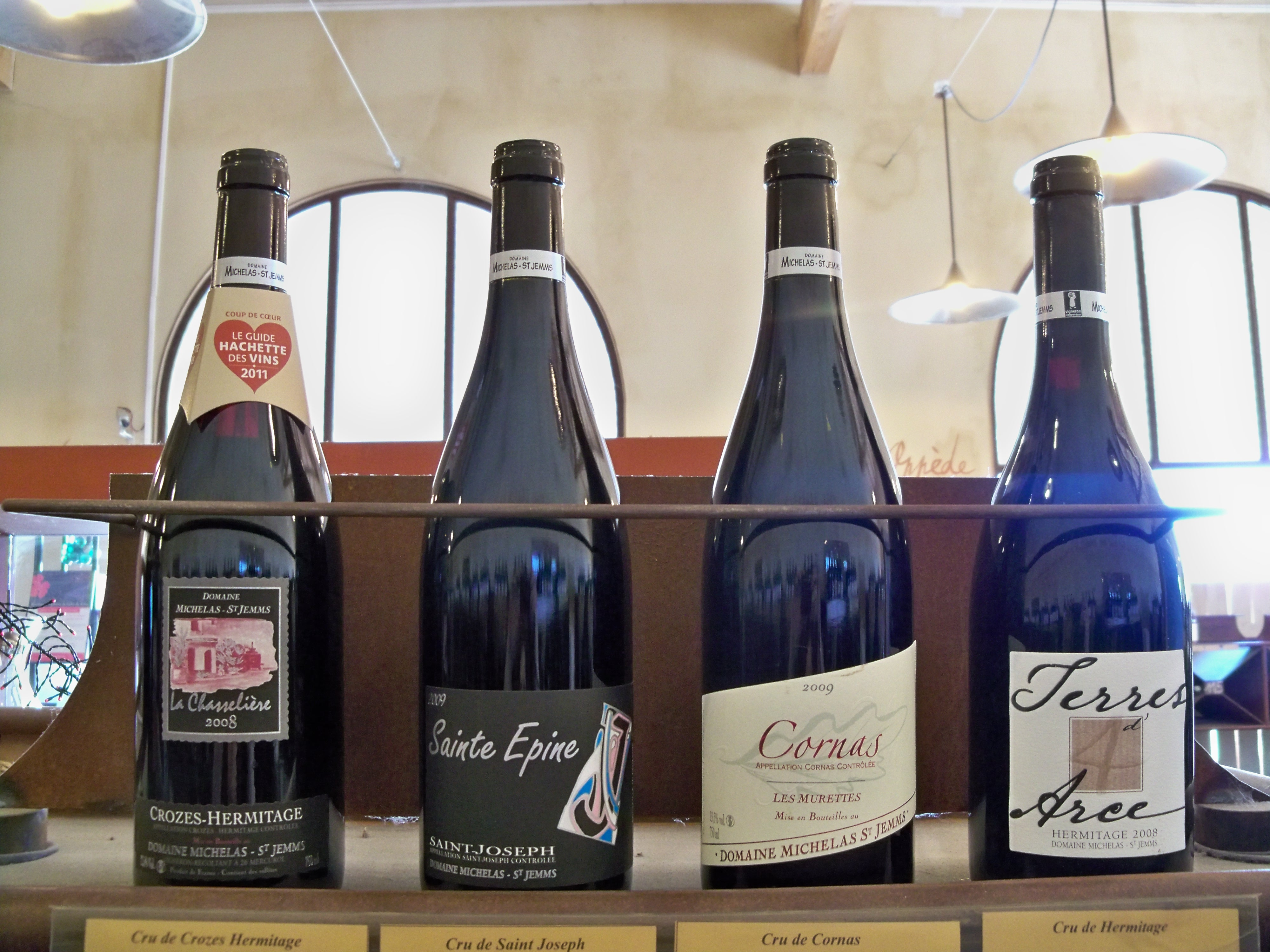 bouteilles de Tain l'Hermitage